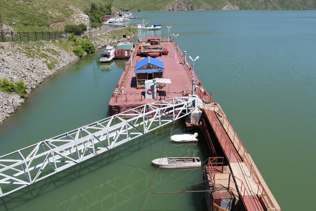 Қазақша (кирил): Ертіс өзені жағалауындағы су электр станциясы